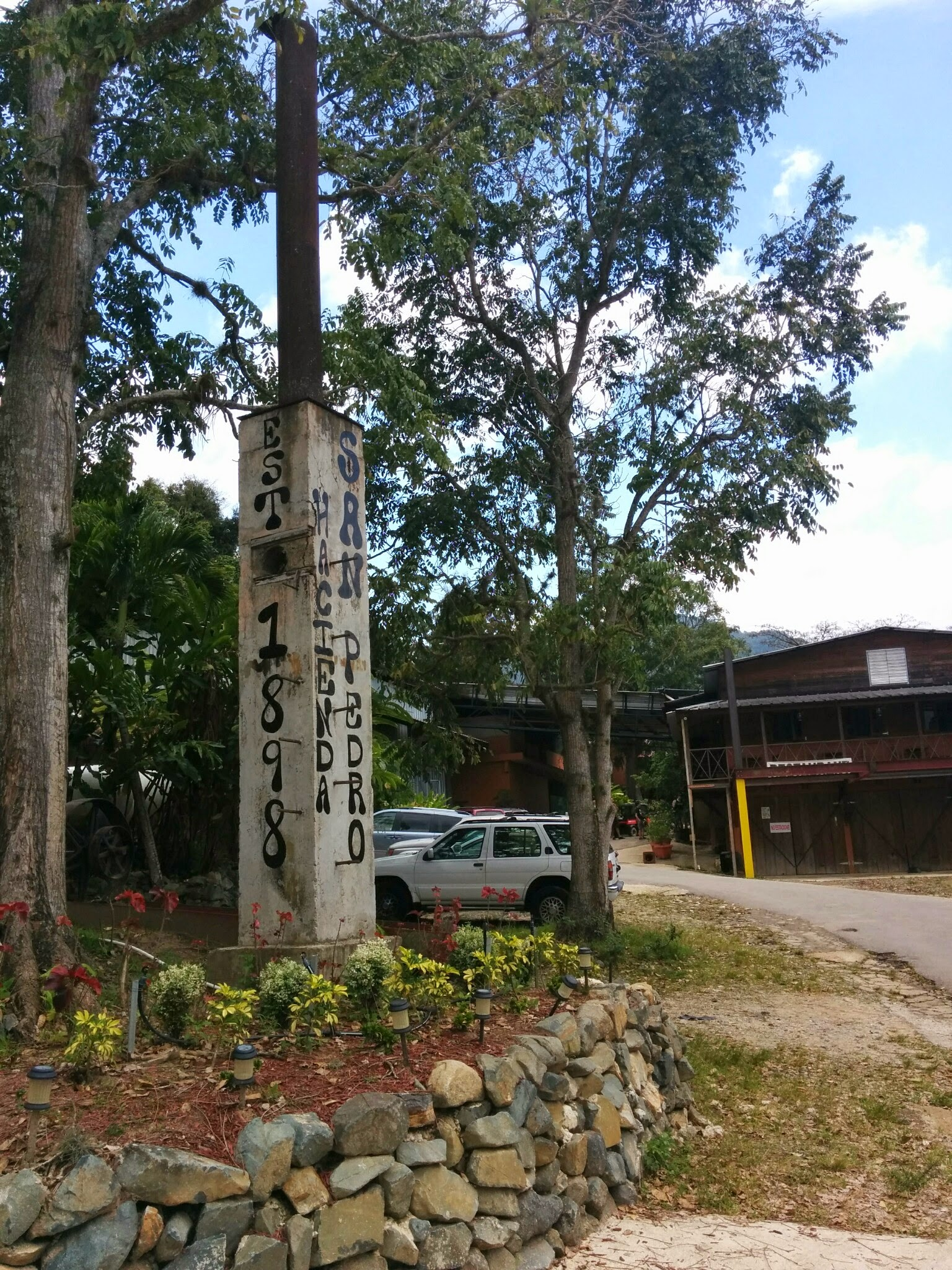 Hacienda San Pedro